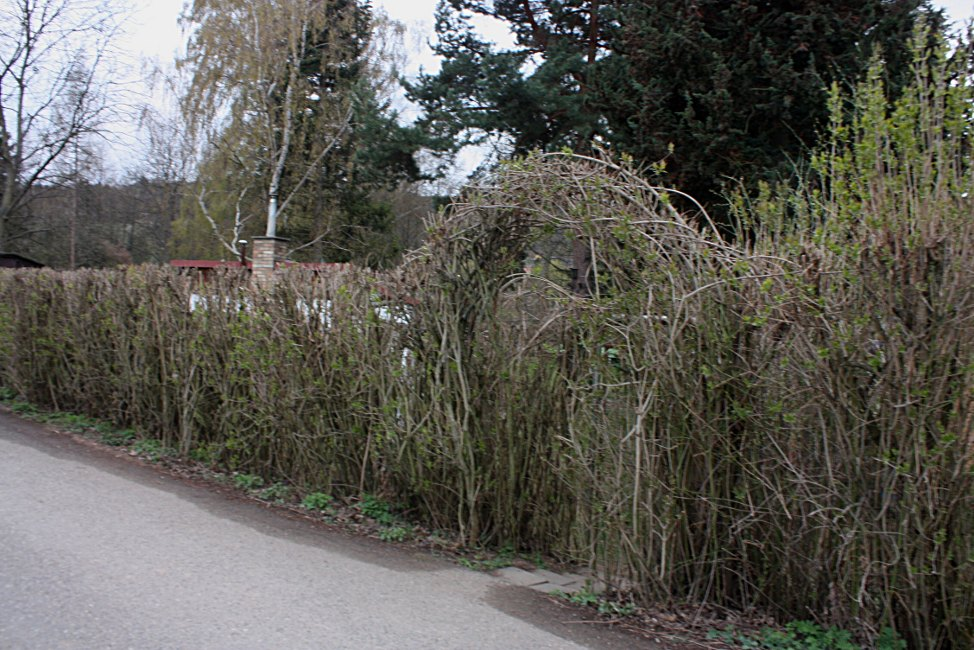 Živý plot, šeřík, syringa vulgaris Brno Jundrov